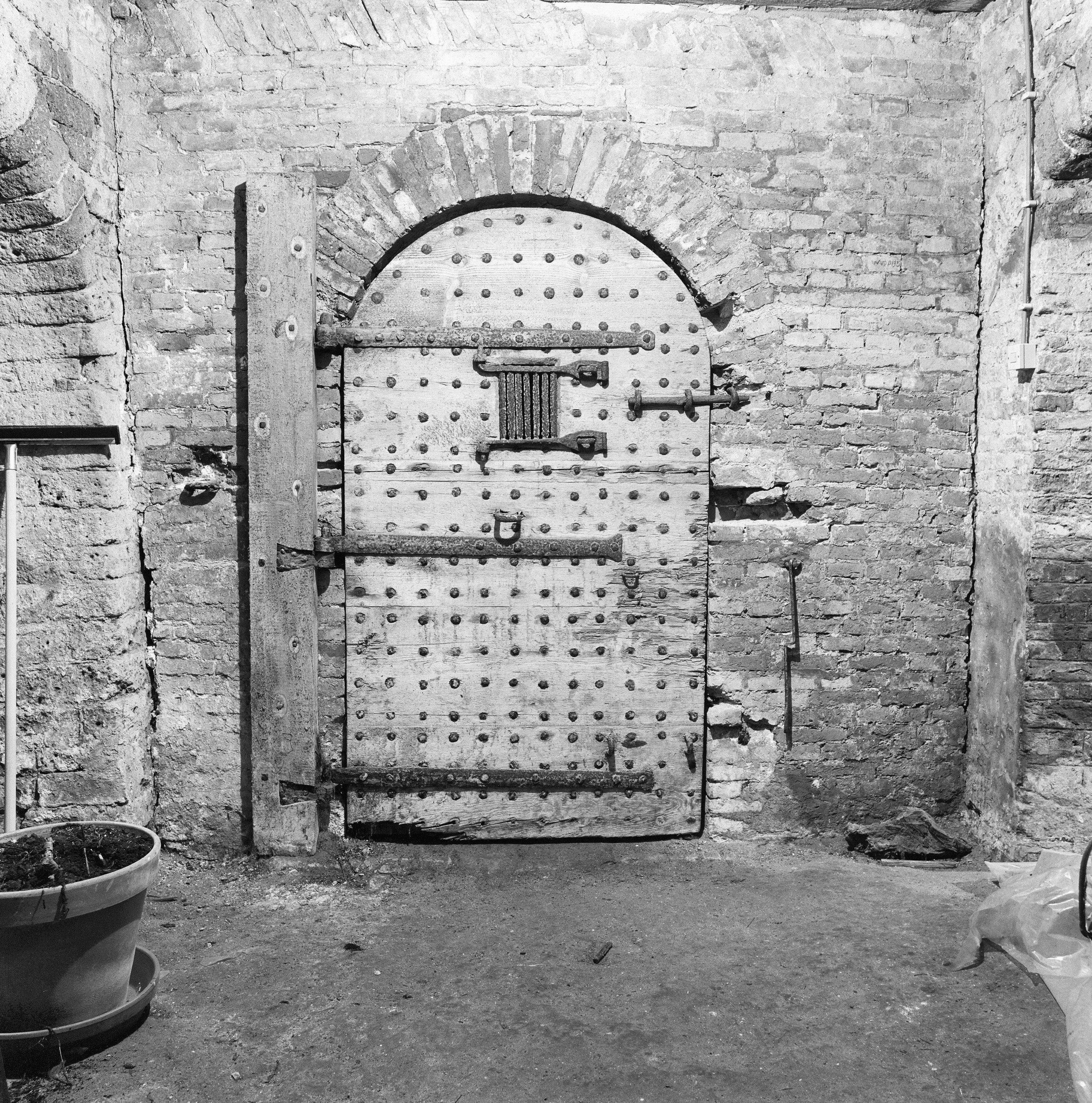 Ned.Herv.Kerk: gevangenissen in de toren